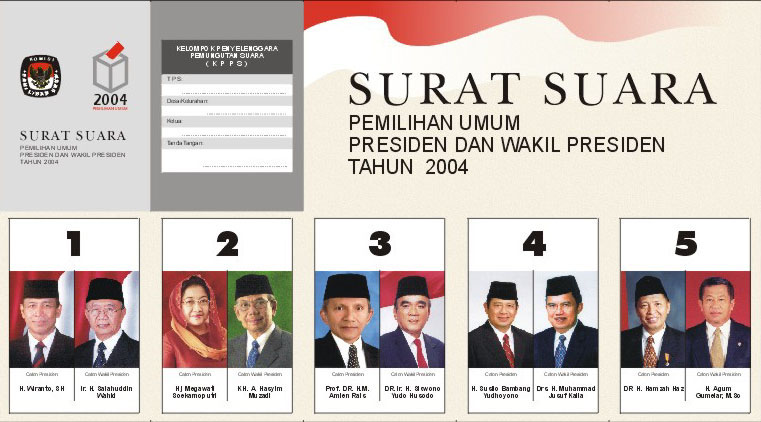 2004 Indonesian Presidential Election Ballot